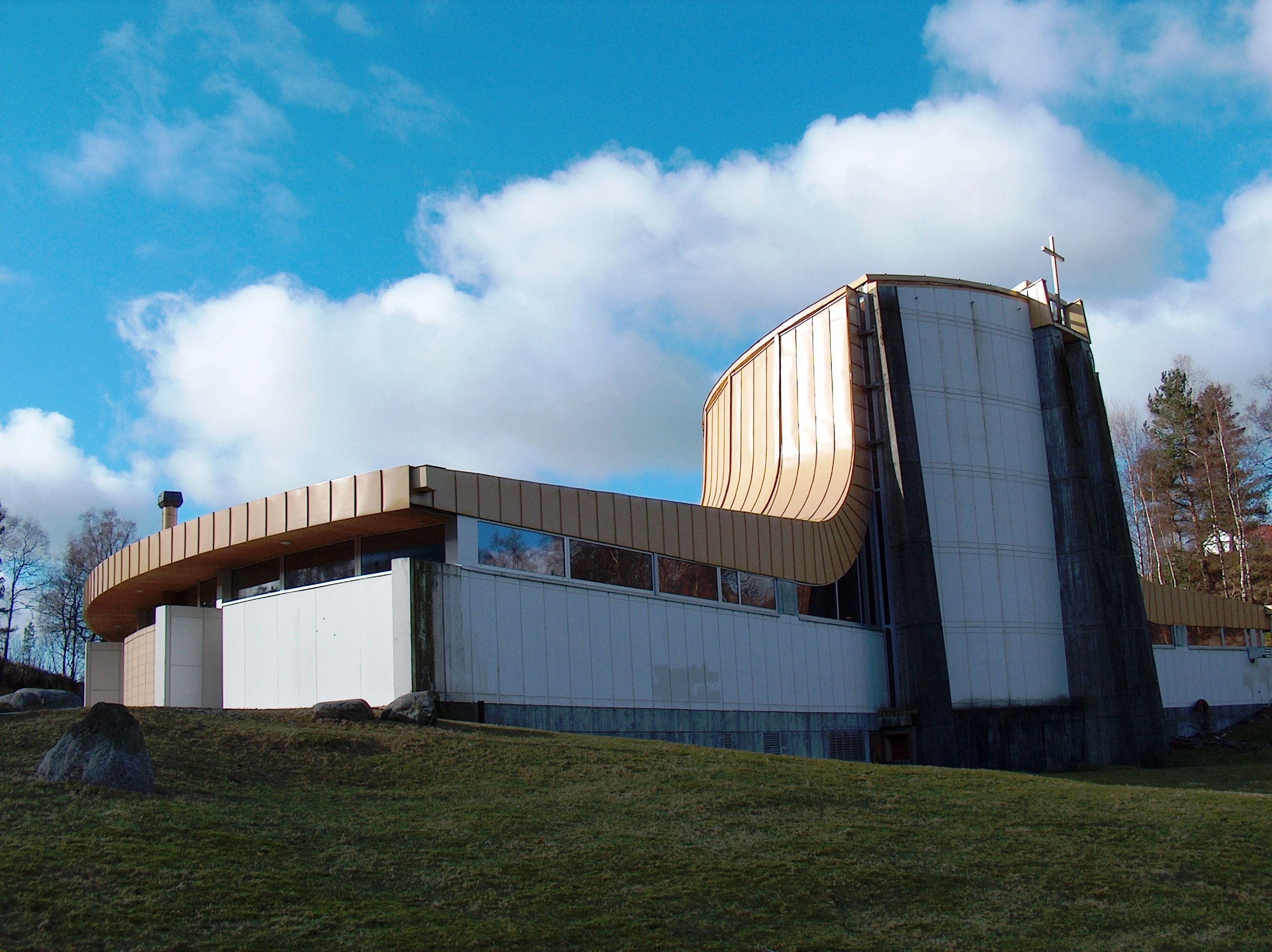 Fyllingsdalen kirke front